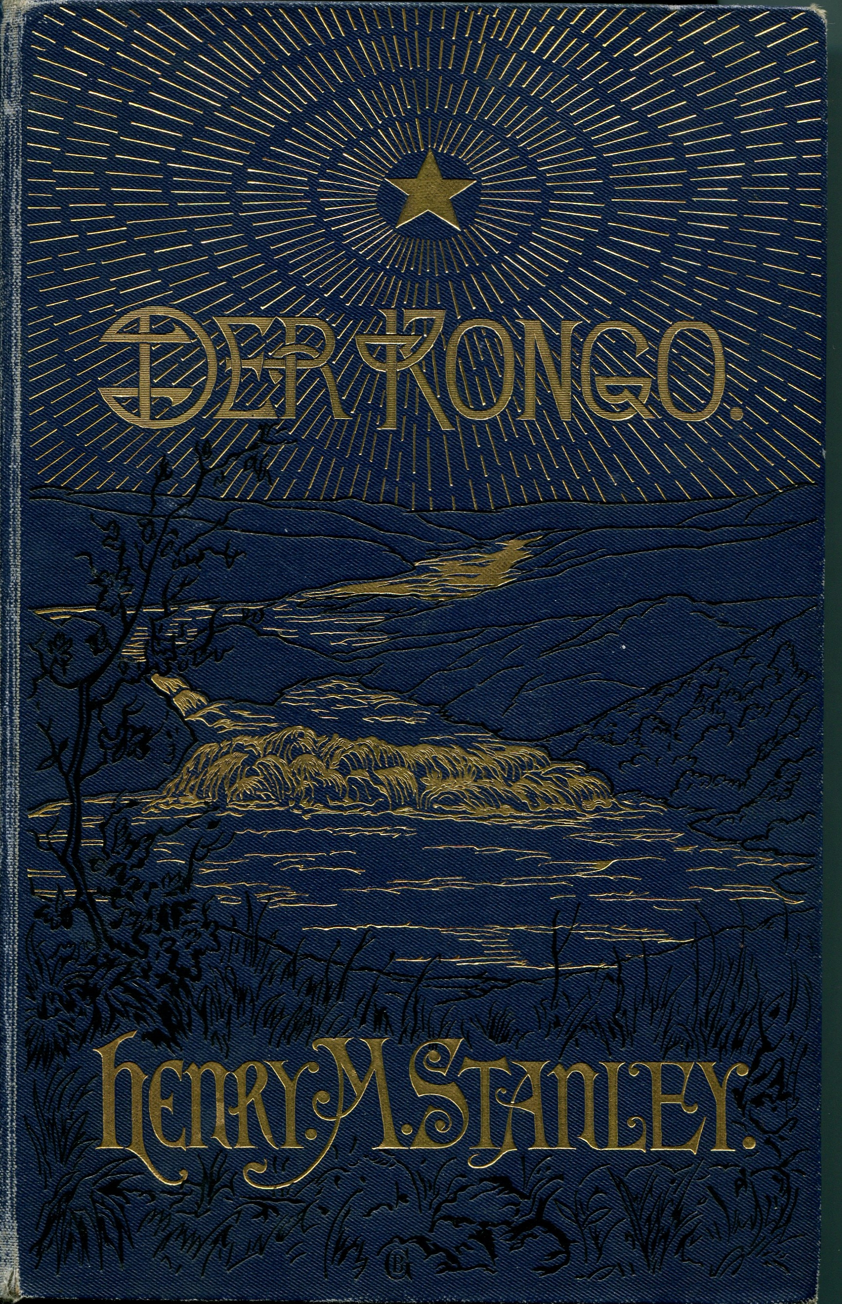 Buchtitel Kongo von Henry Morton Stanley, aus dem Englischen von H. von Wobeser, Brockhaus-Verlag 1887